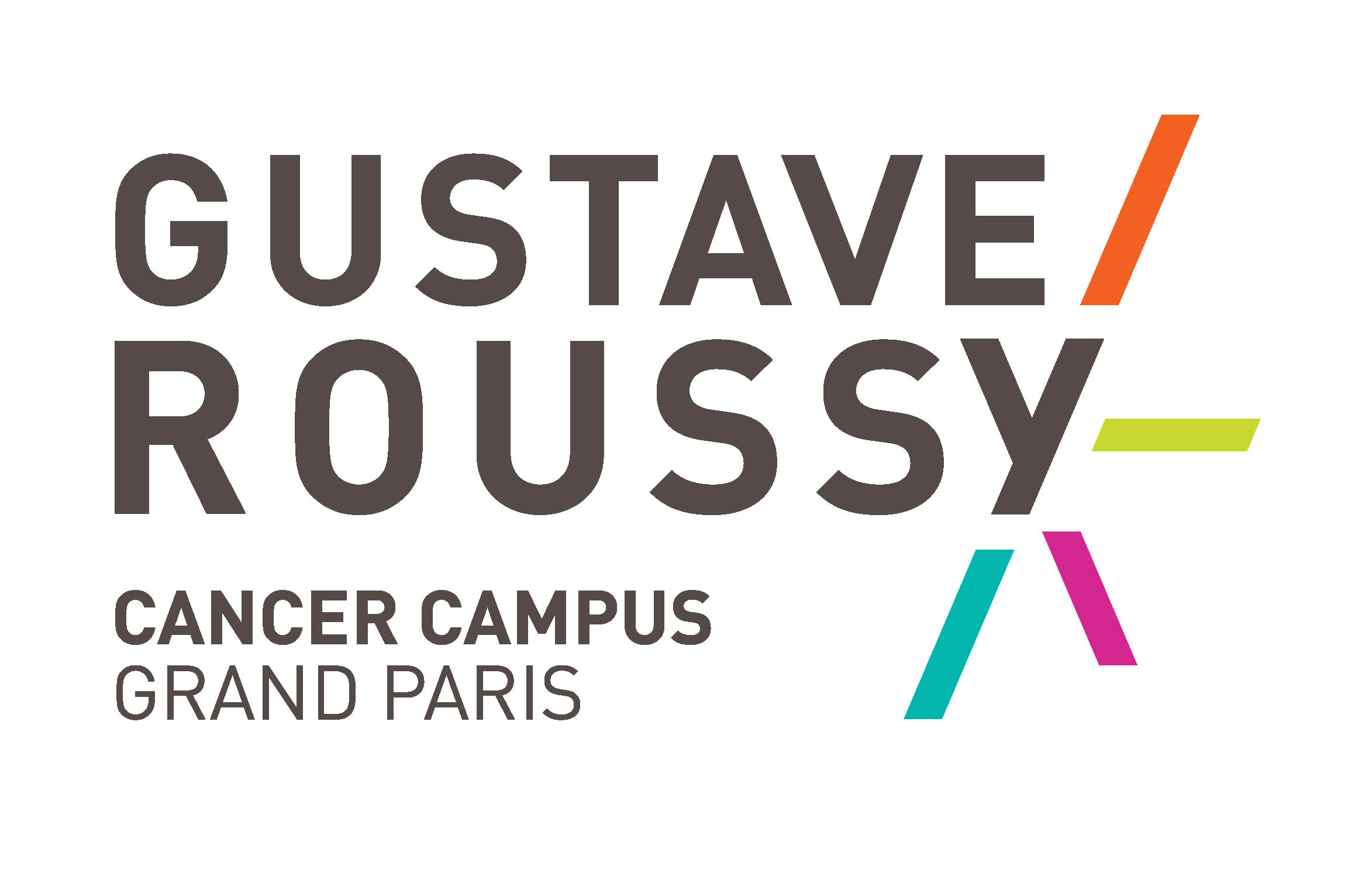 Logo de Gustave Roussy, 1er centre de lutte contre le cancer en Europe